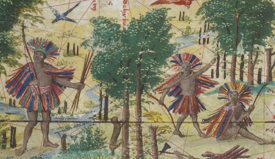 Indígenas brasileños en el mapa de la "Terra Brasilis" del Atlas Miller.